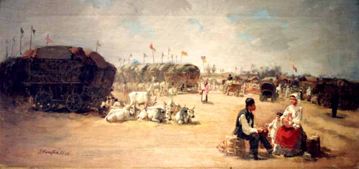 Sava Henţia (1848 - 1904) - Târgul Moşilor